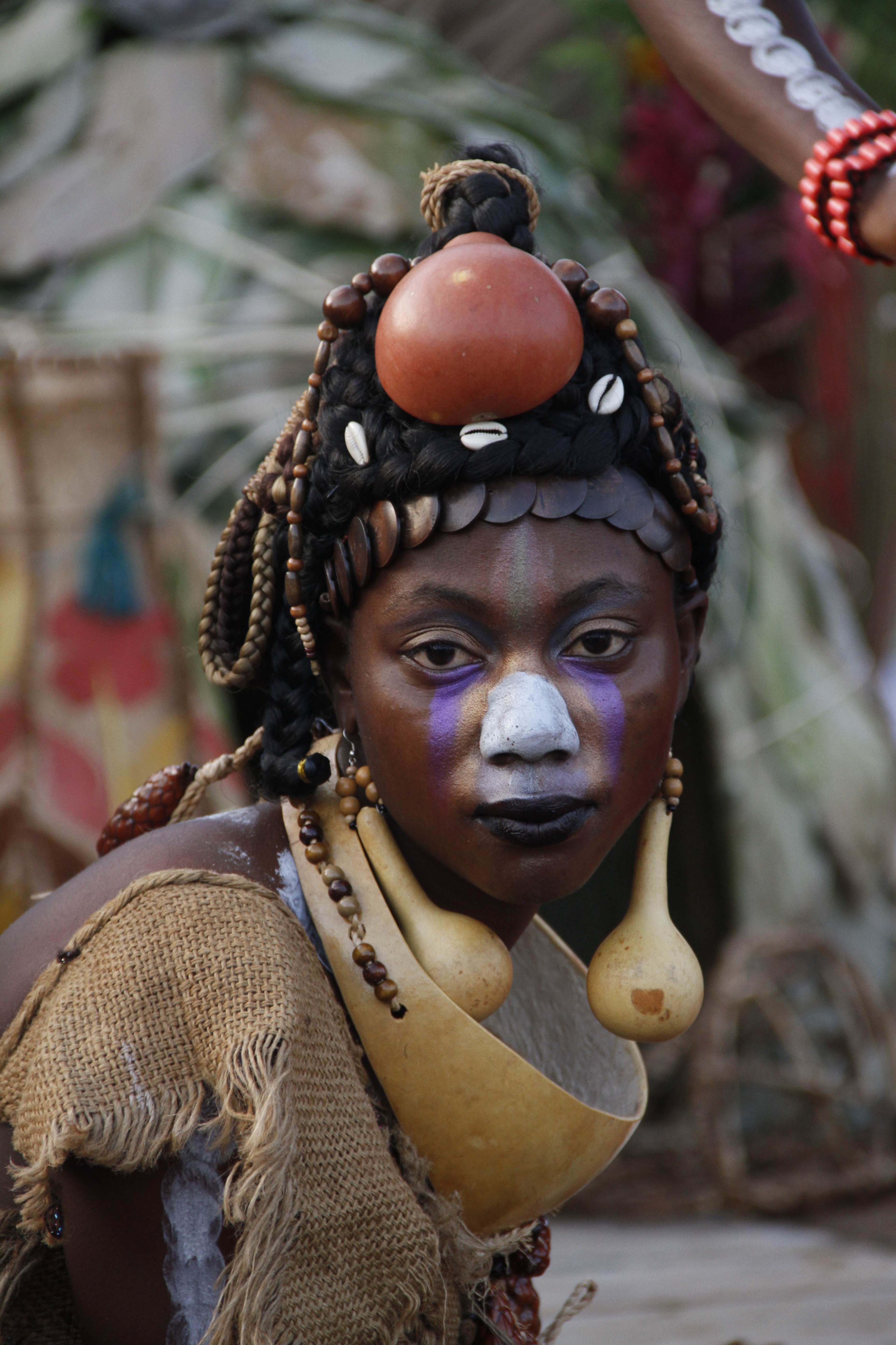 Danseuse avec des accessoires de danse lors du Fenac (Festival National des Arts et de la Culture) à Yaoundé au Cameroun This is an image from Cameroon